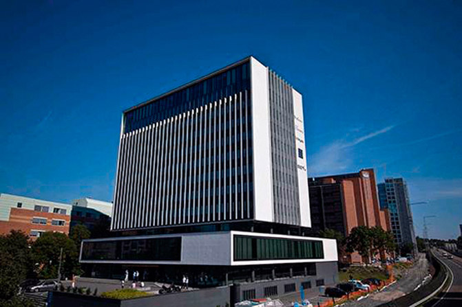 Lemminkäinen Norge AS har hovedkontor på Helsfyr, og er samlokalisert med Lemminkäinen Anlegg AS.